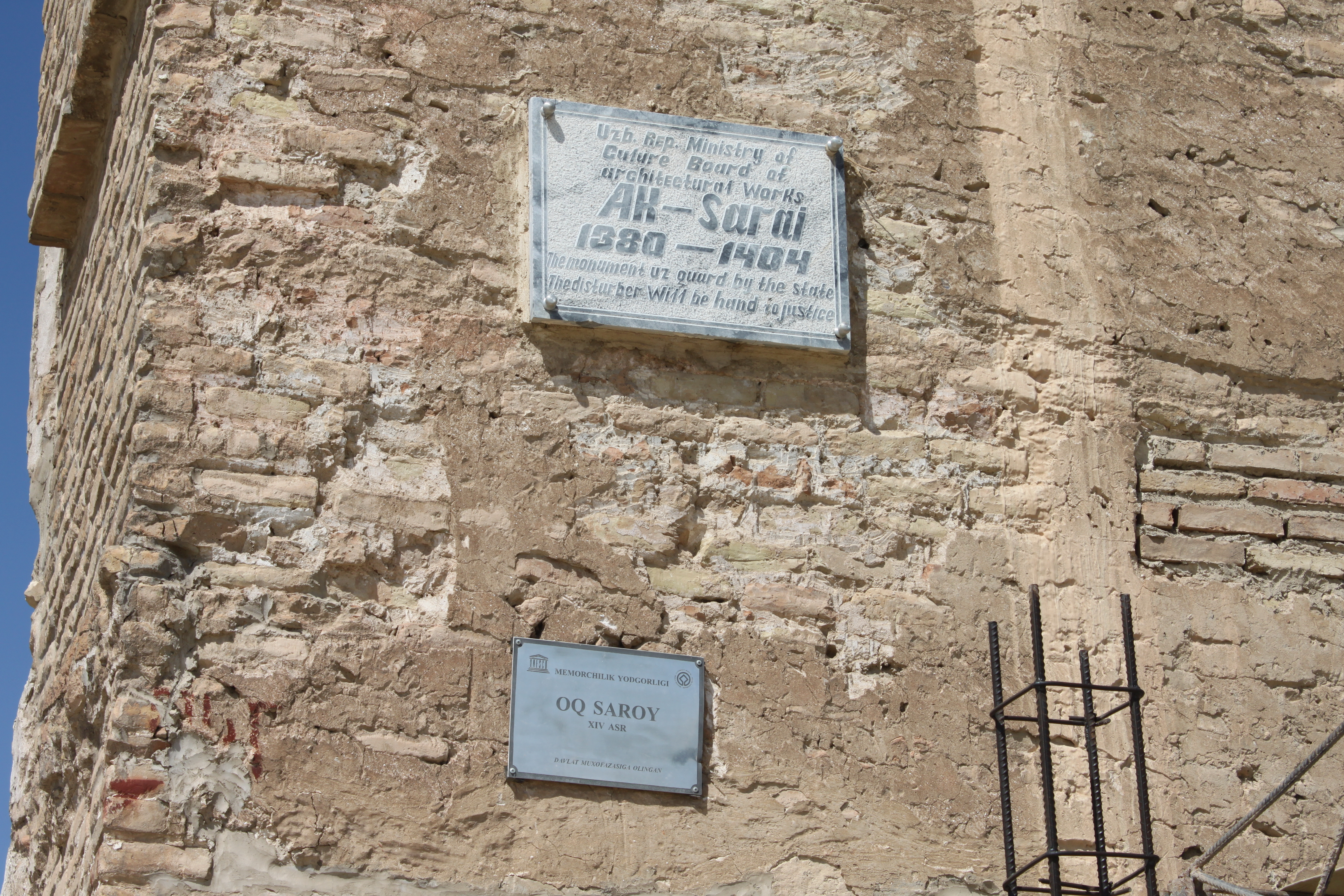 Ak Sarai à Shahrisabz - panneau d'informations